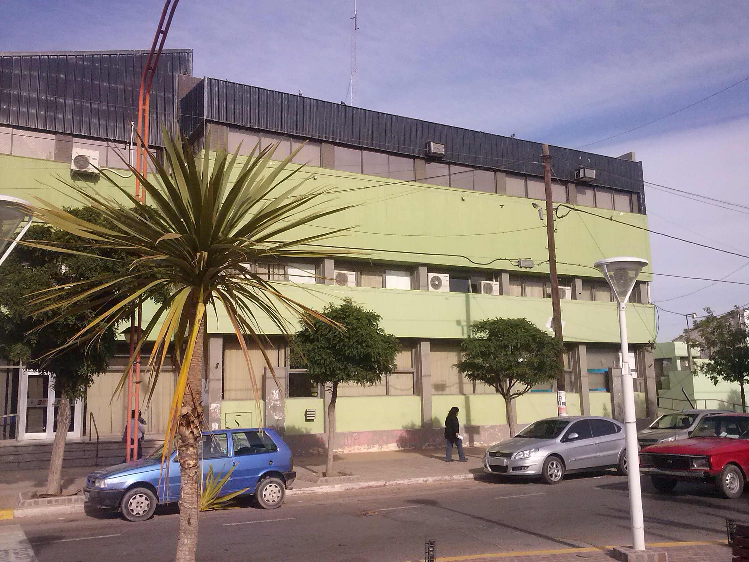 Sede de la municipalidad de Cutral Co vista desde la plaza